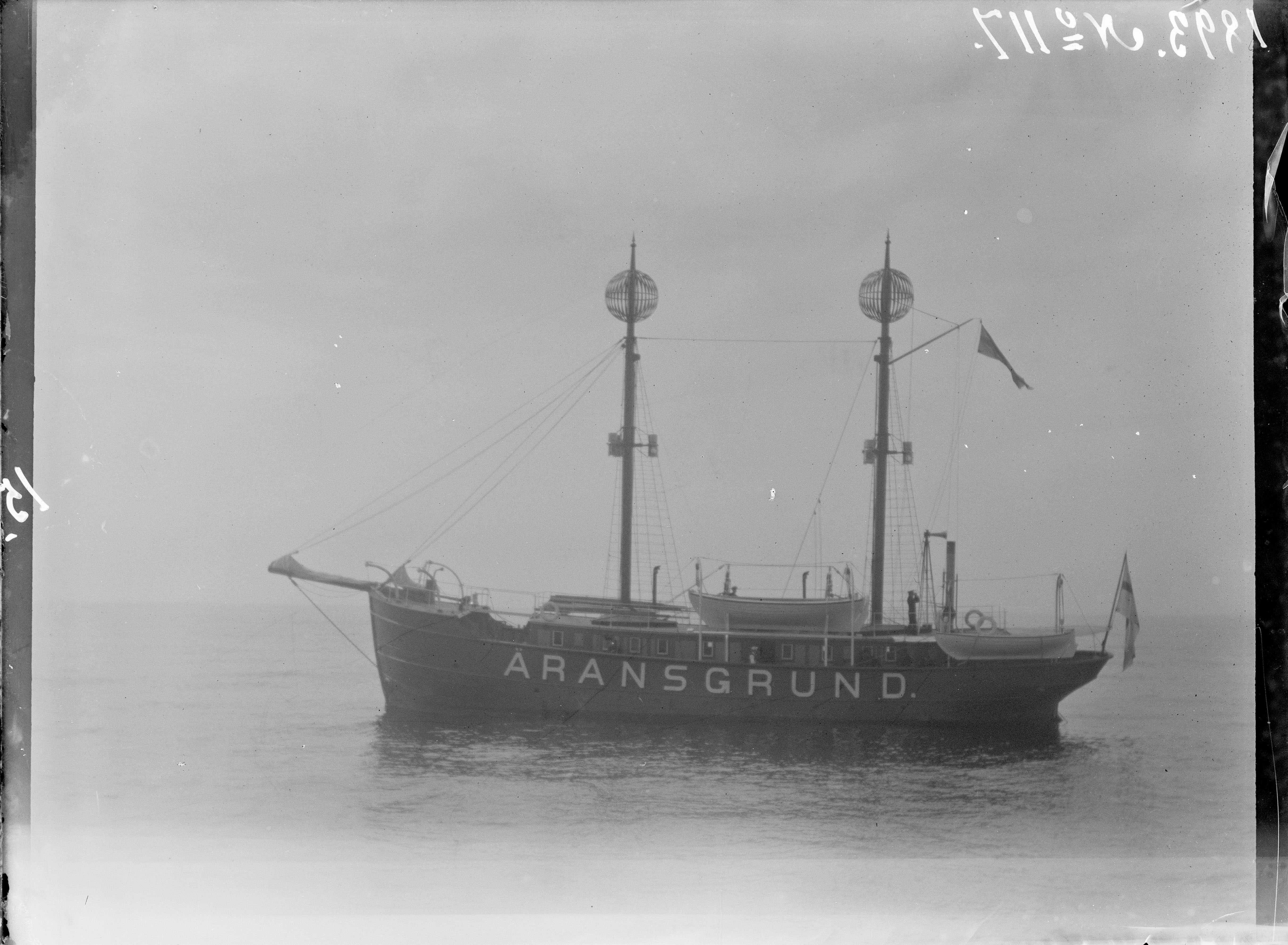 Majakkalaiva Äransgrund merellä ilmeisesti vuonna 1893.